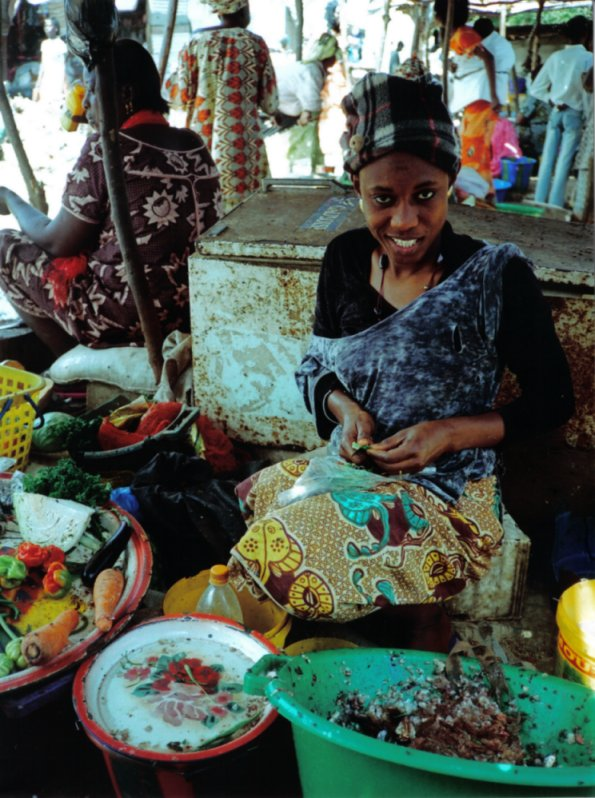 Marché à Thiès, Sénégal